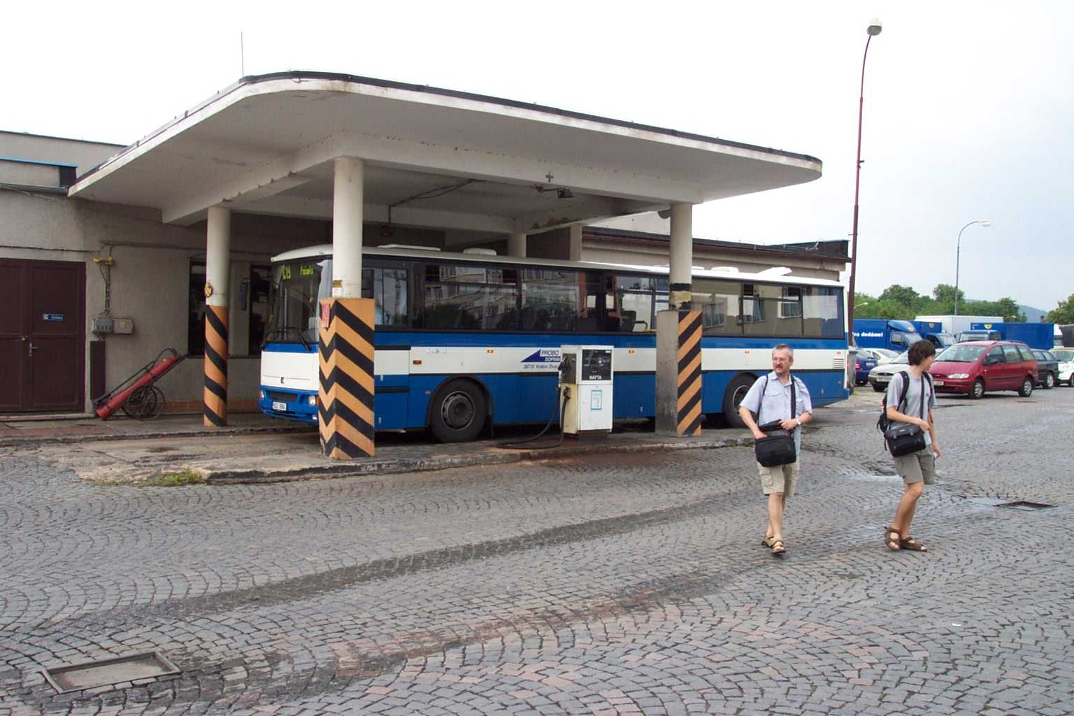 Beroun, bus type Karosa C954 - Autobus typu Karosa C954 v Berouně